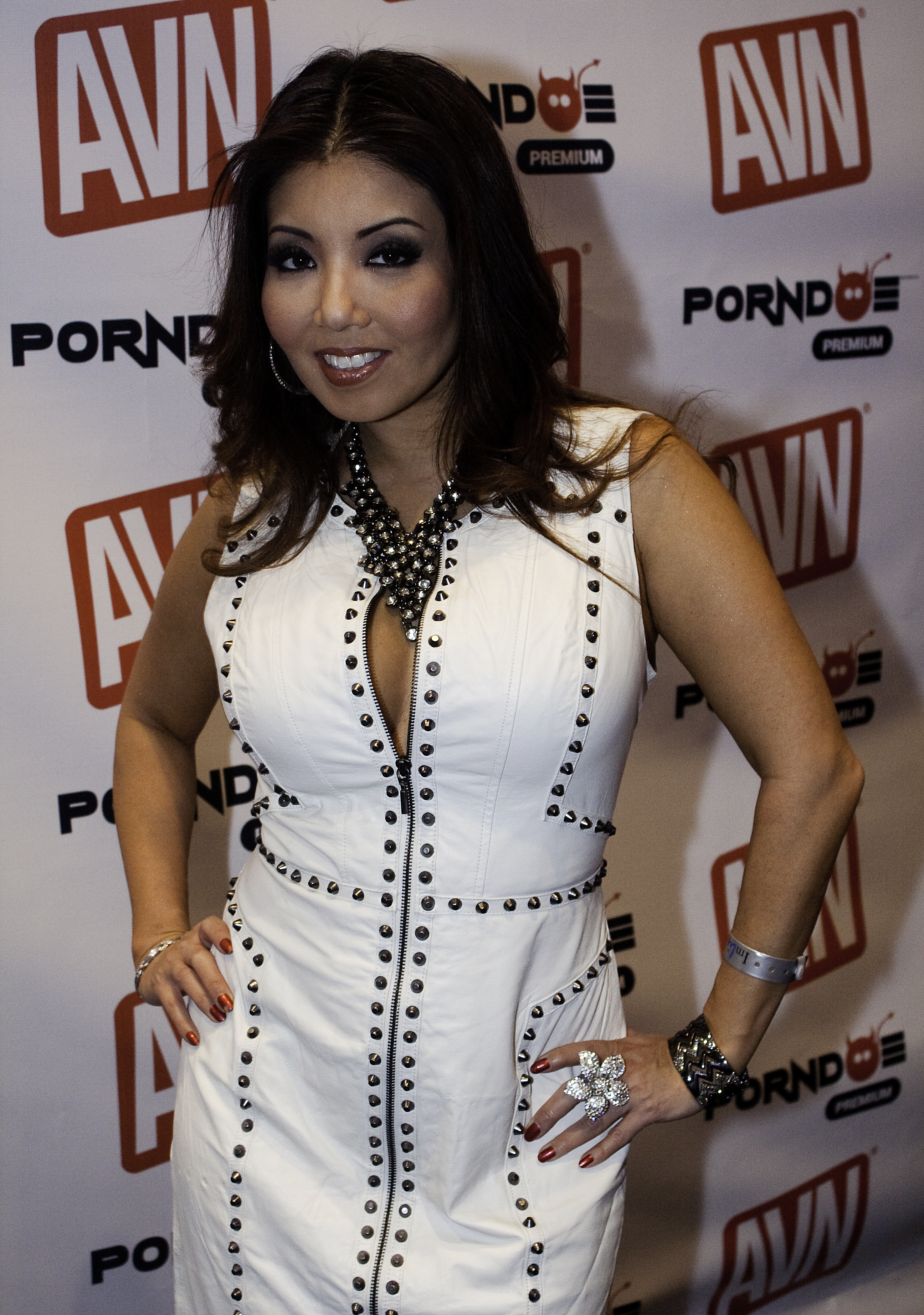 AEE16_0489bas